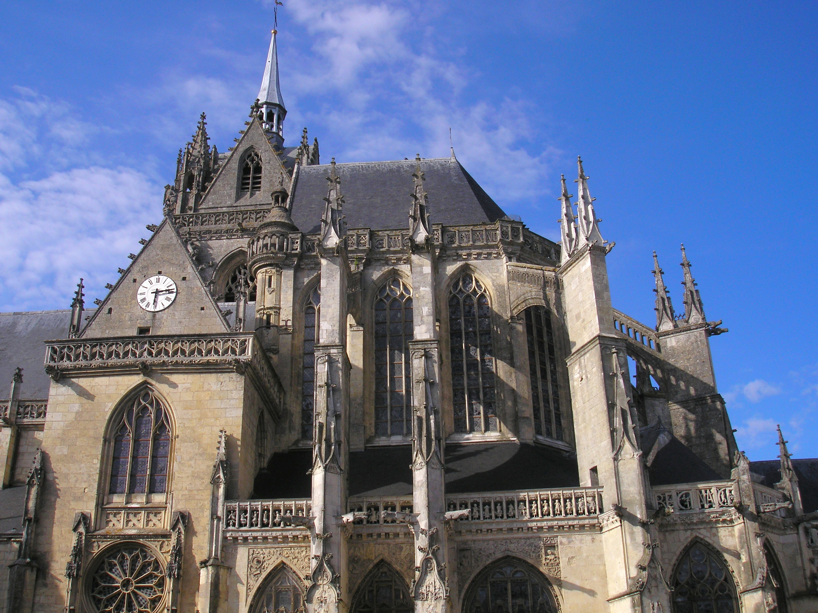 La Ferté-Bernard (dép. de la Sarthe - région Pays de la Loire). L'église Notre-Dame-des-Marais.